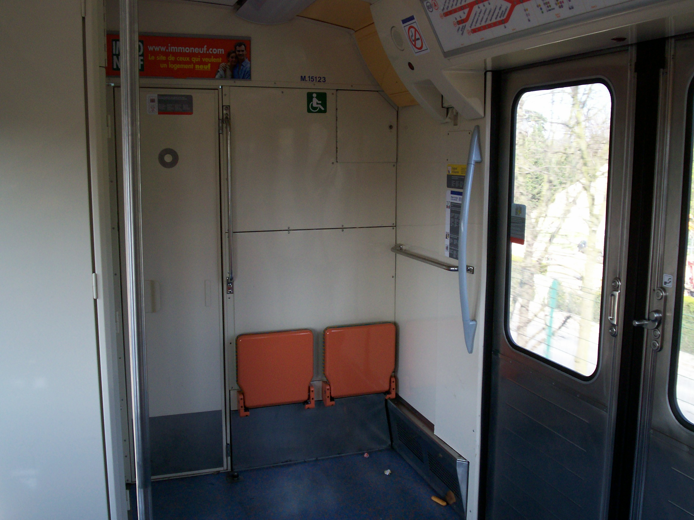 MS 61 Rénové